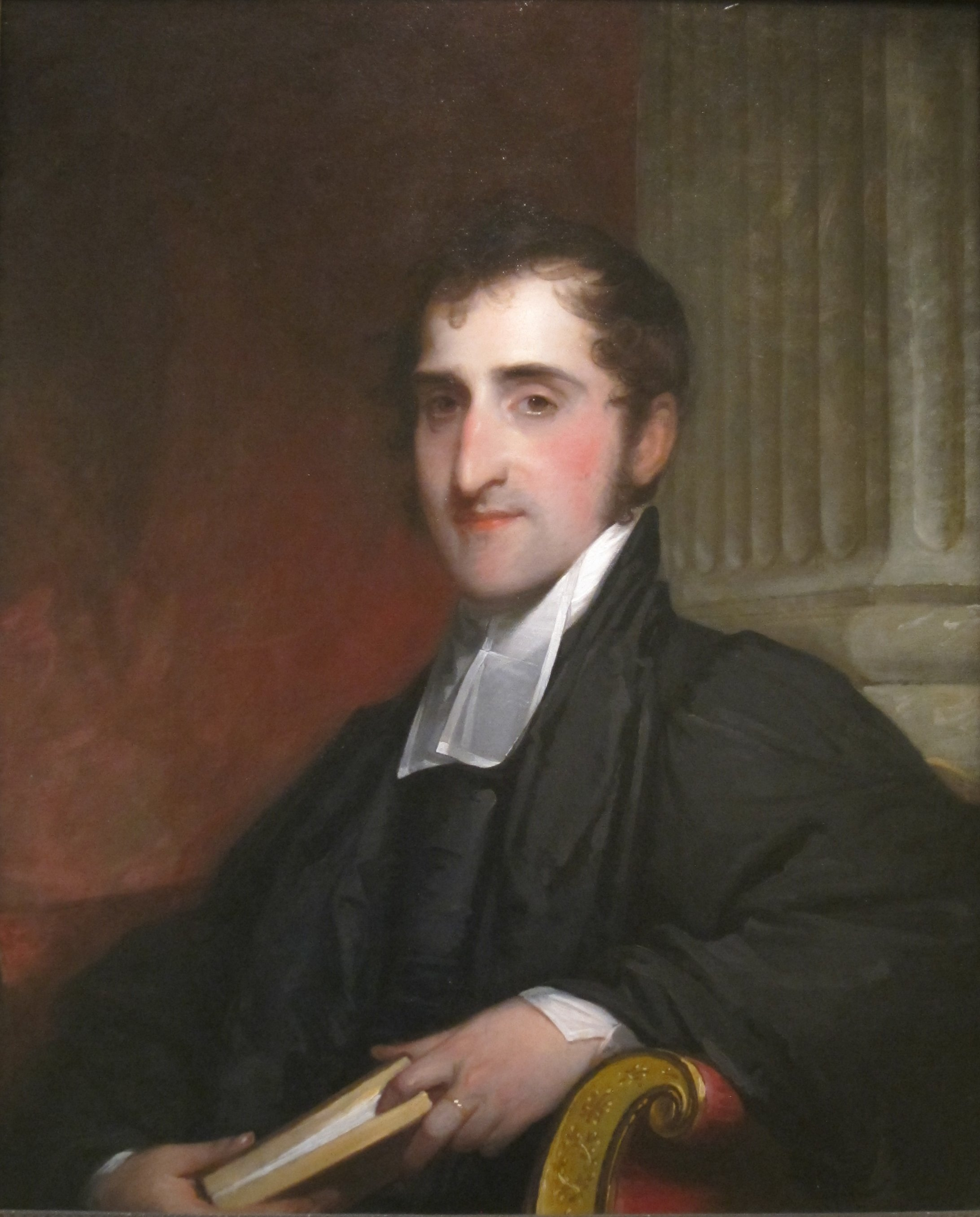 Reverend Joseph Stevens Buckminster, D.D.